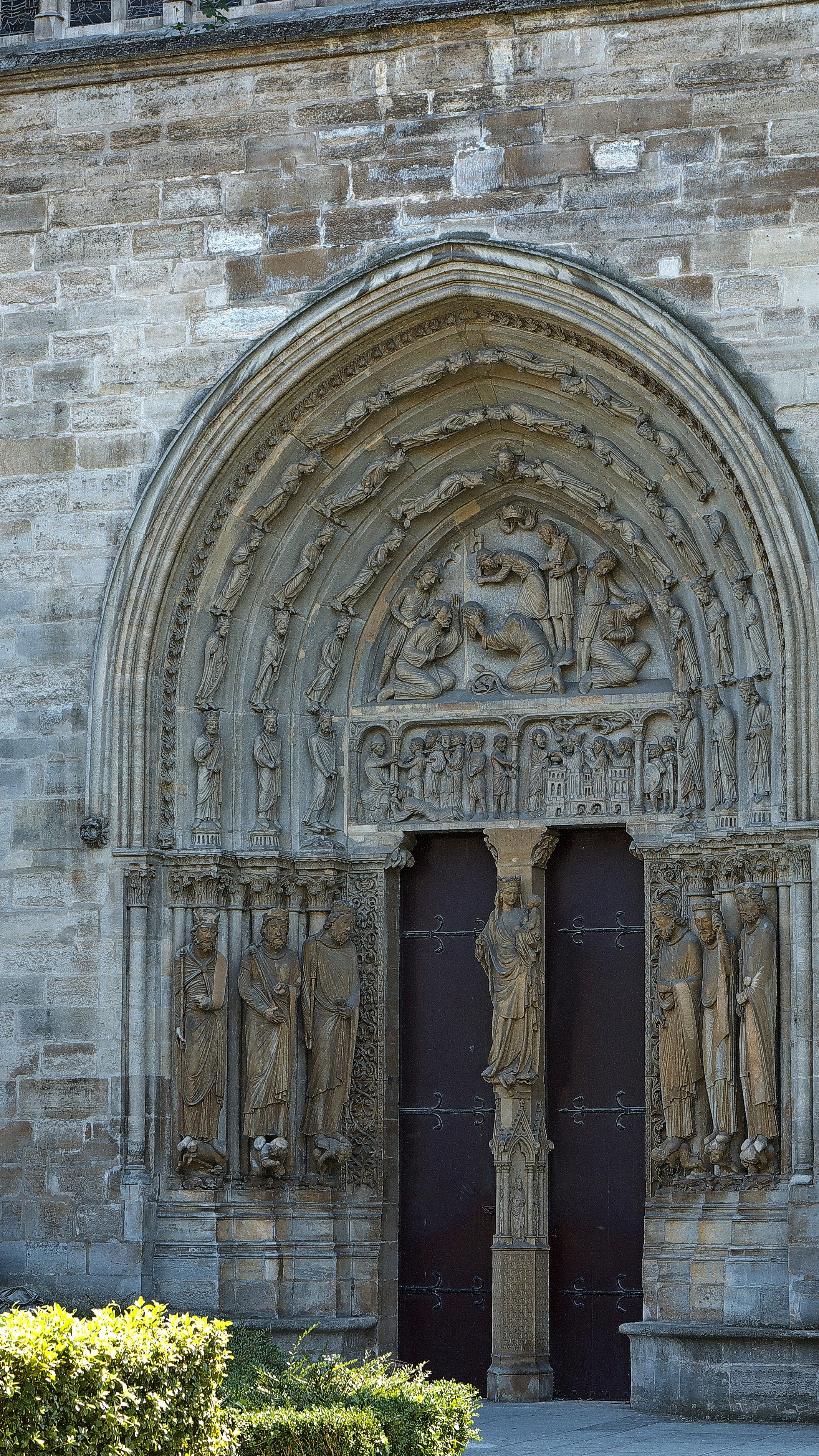 Porte de côté de la basilique Saint-Denis (France). .